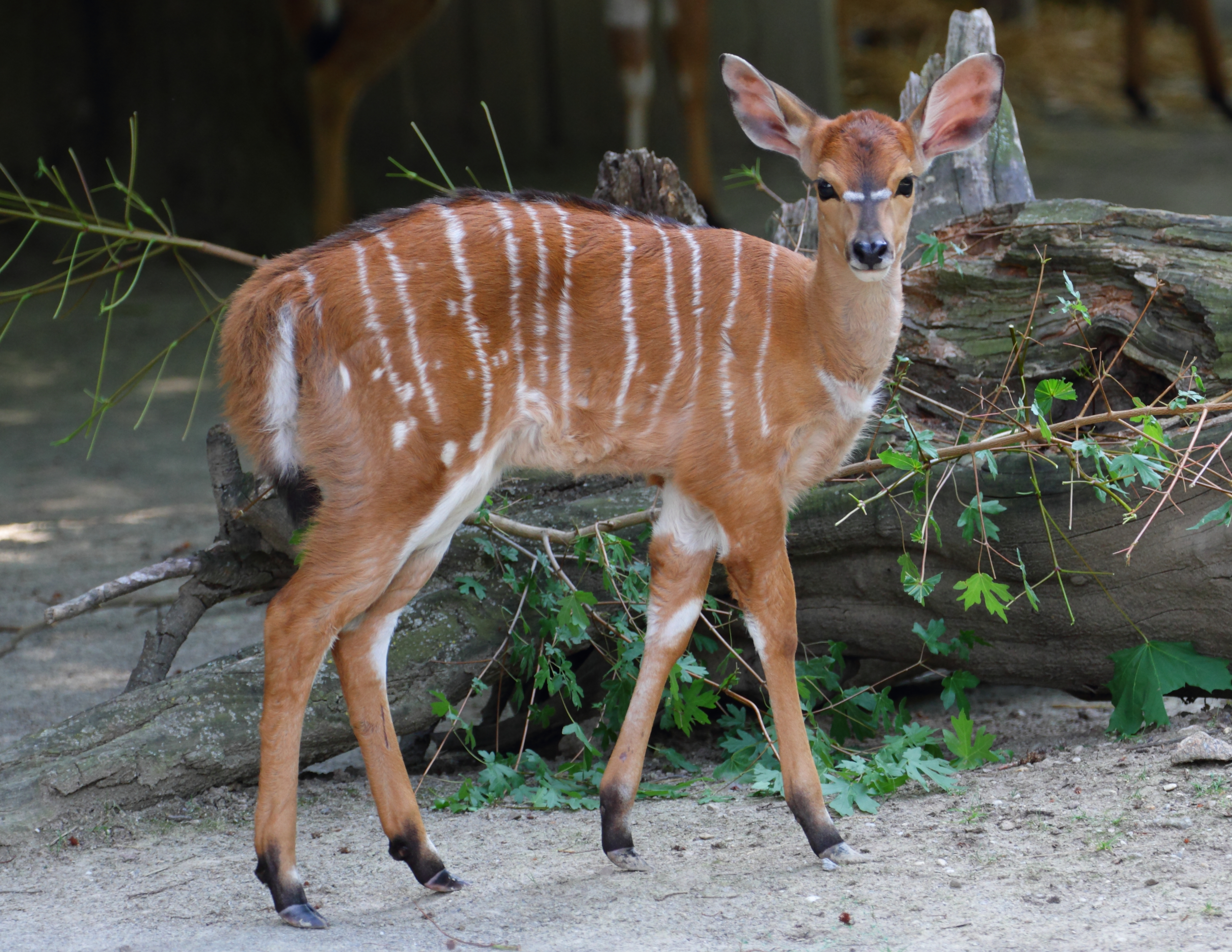 Ein am 8. Mai 2012 geborenes Nyala im Tiergarten Schönbrunn.